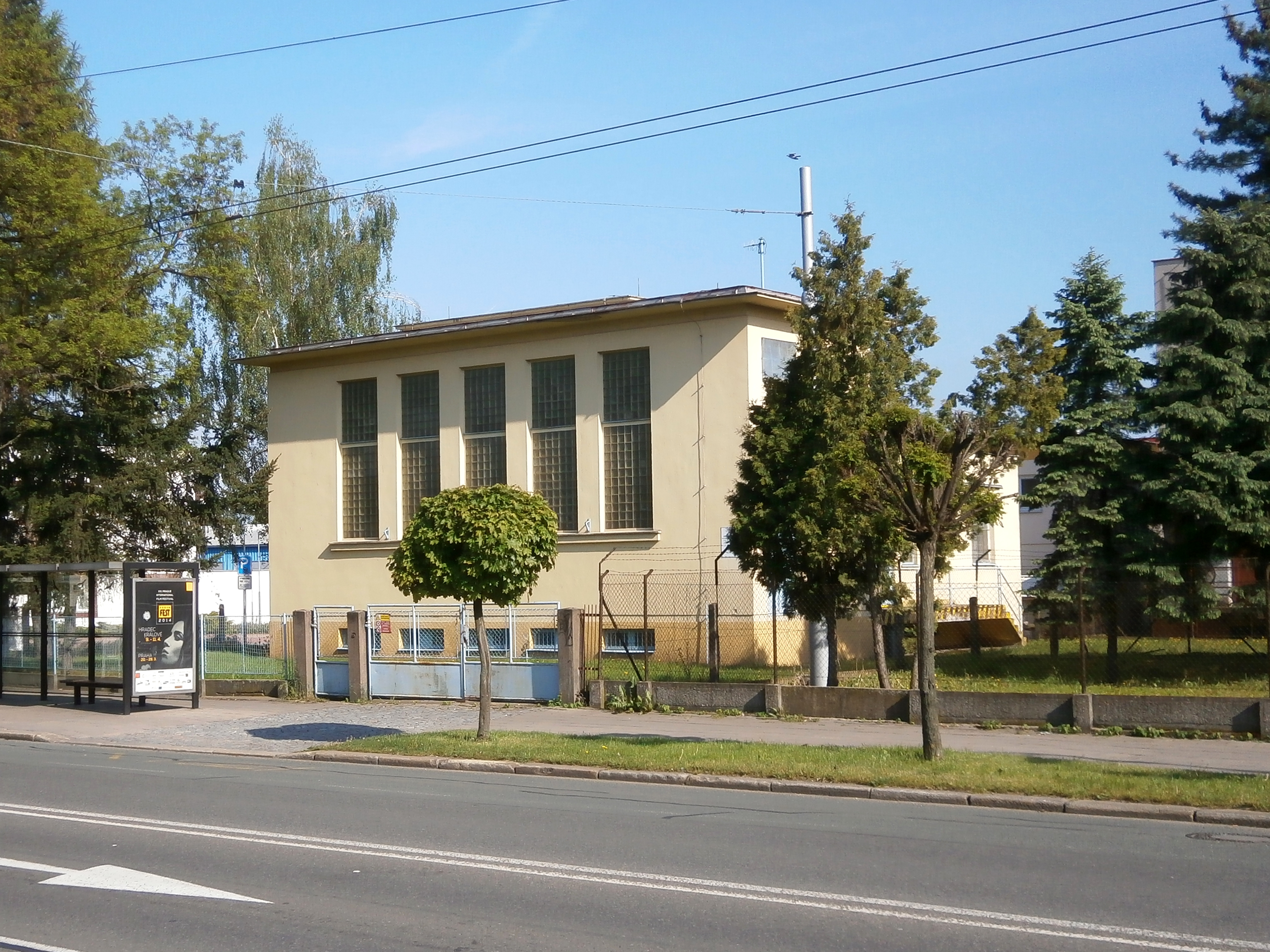 Trolejbusová měnírna v Kuklenách, u zastávky ZVU, Pražská třída, vedle ul. Slepá.